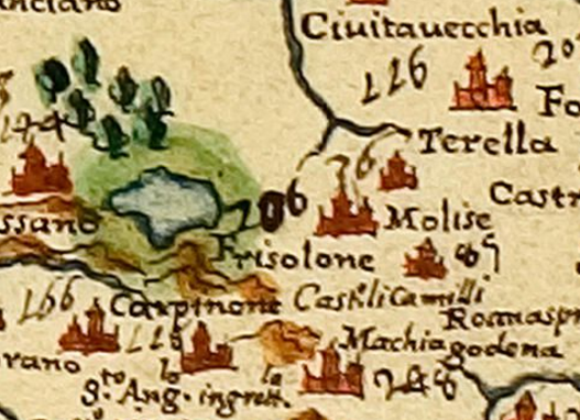 Frosolone e i paesi circostanti in una mappa del Seicento